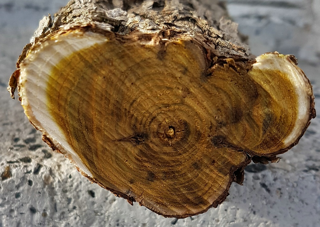 Schnitt durch den Ast eines Perückenstrauches